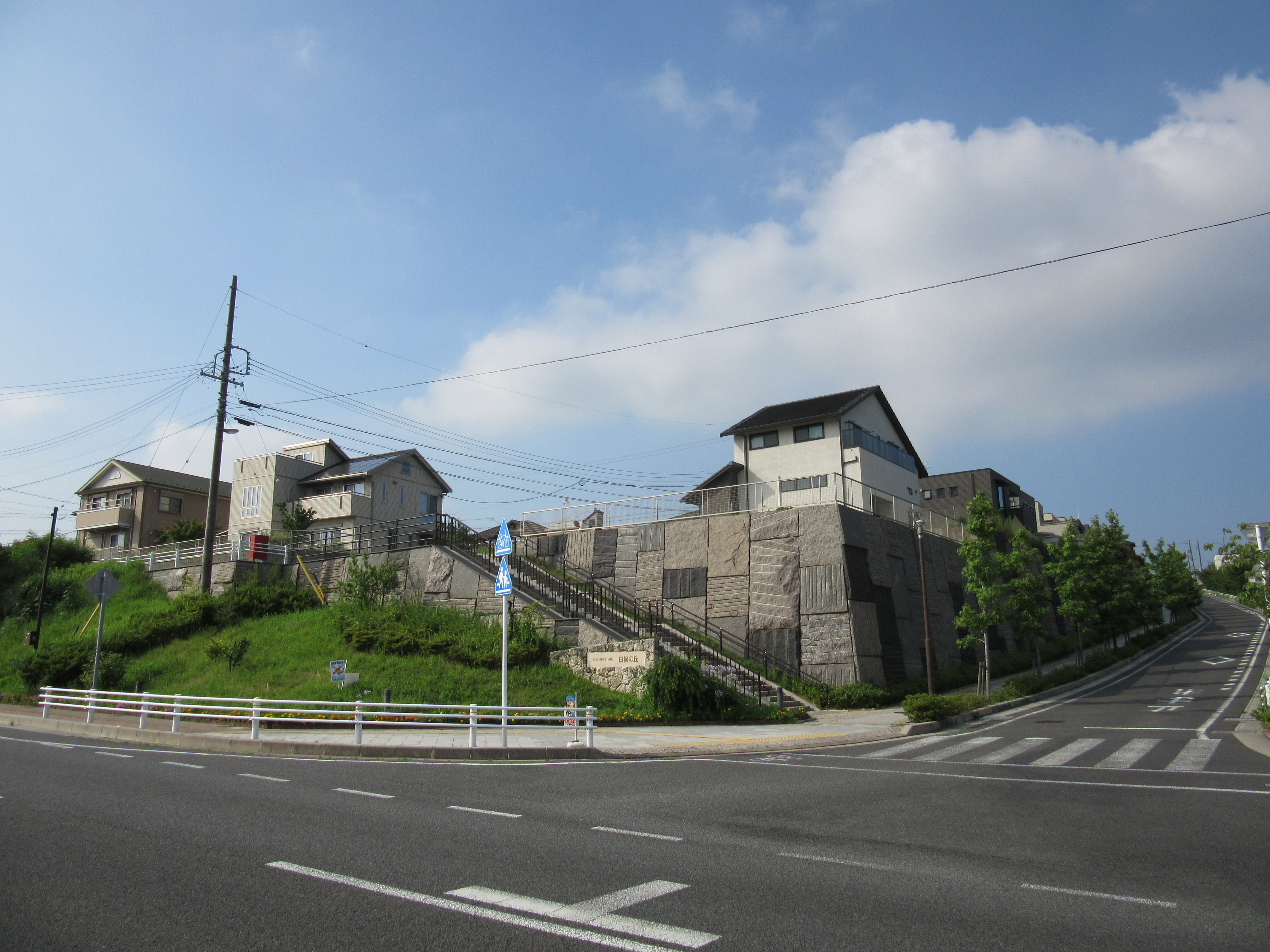 白梅の丘（朝日町図書館より）